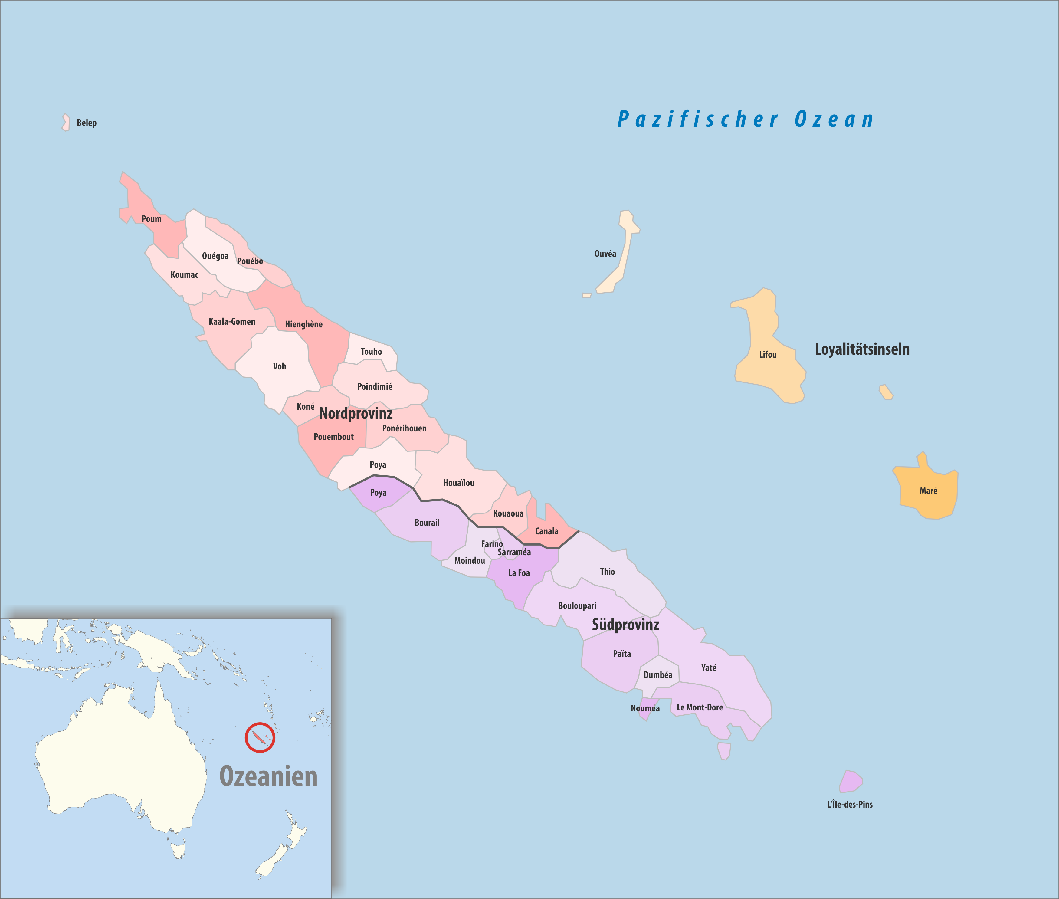 Gemeinden und Provinzen in Neukaledonien